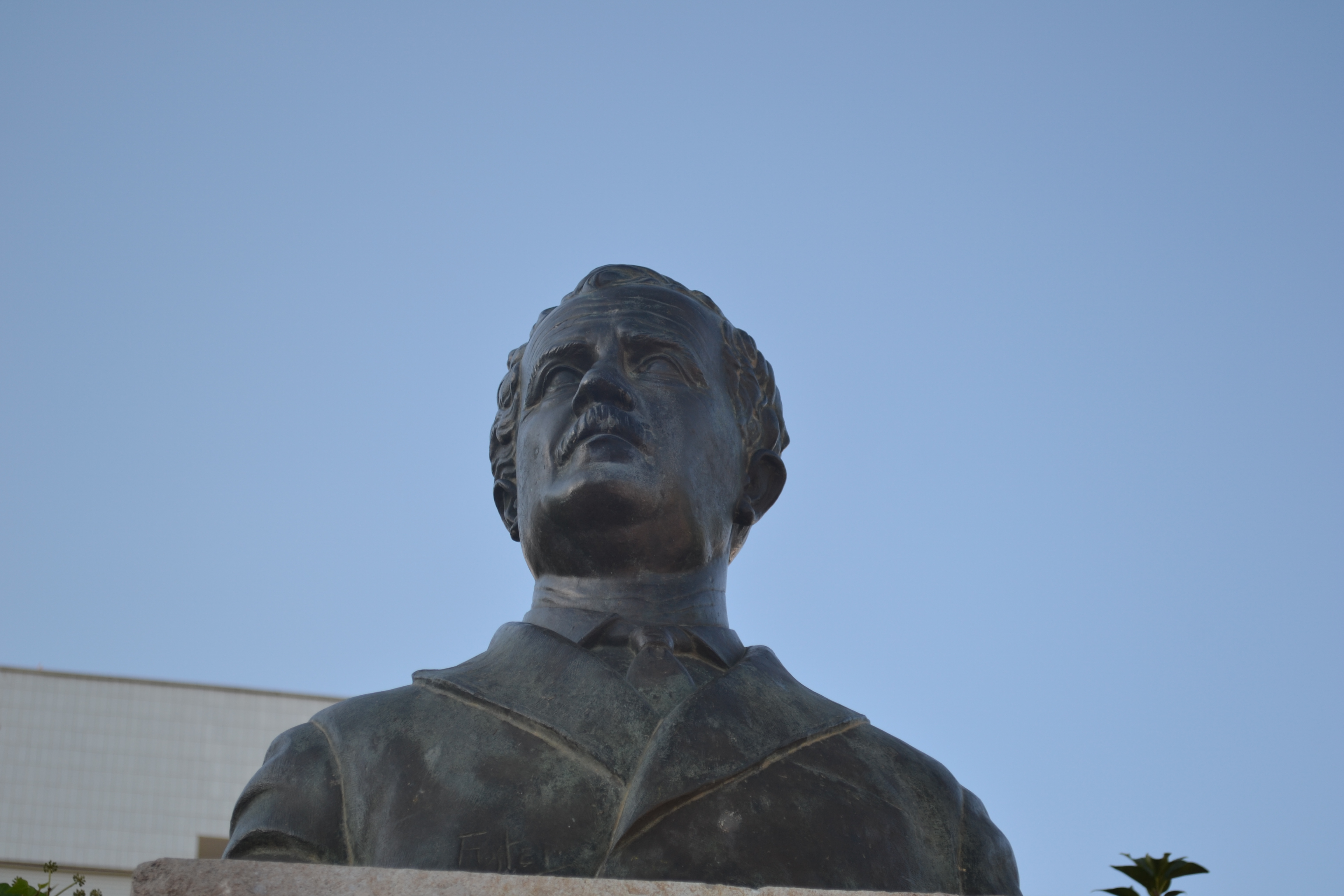 Busto de Carlos Pau Español en Segorbe, su pueblo natal.